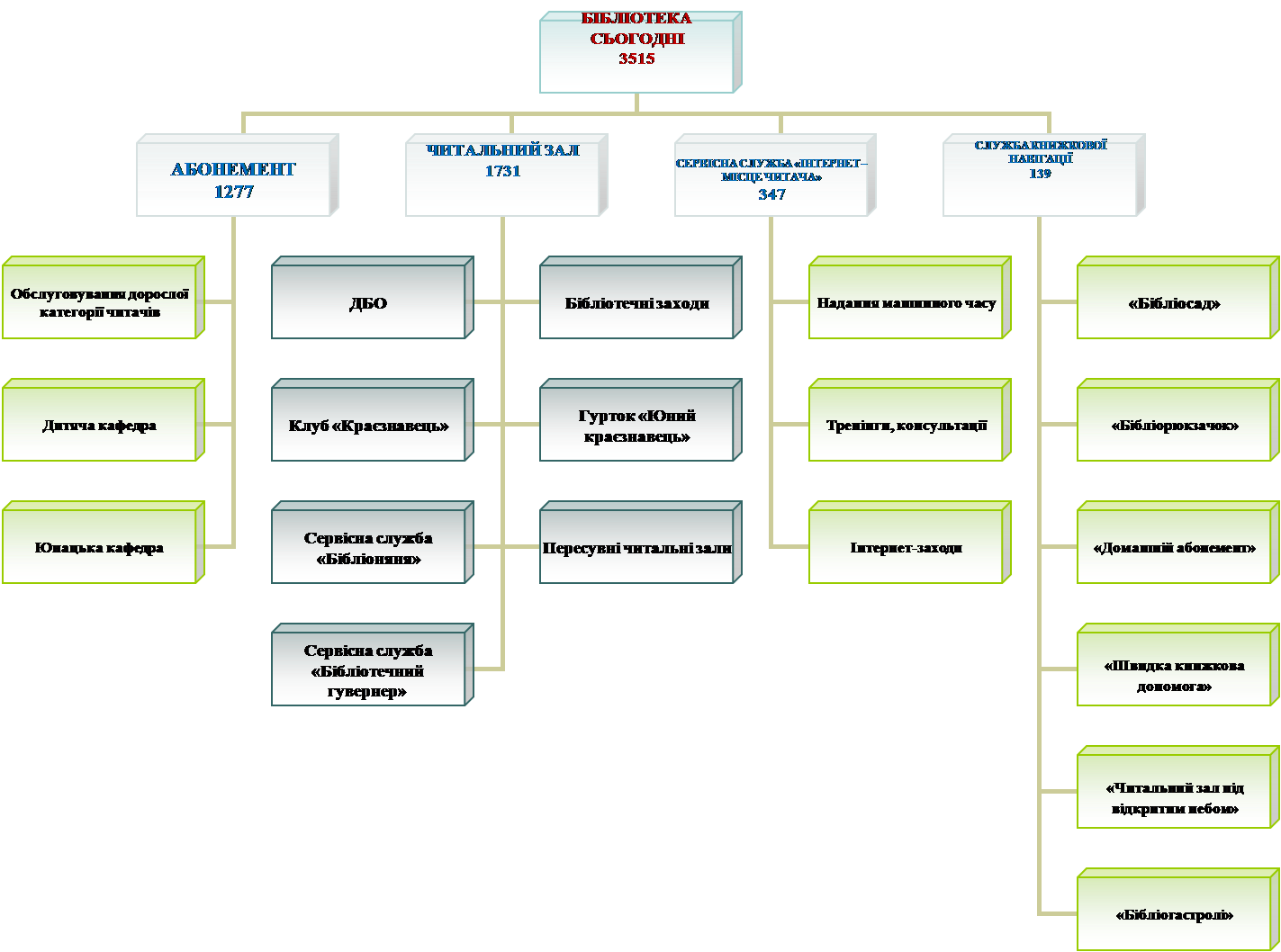 Структура бібліотеки